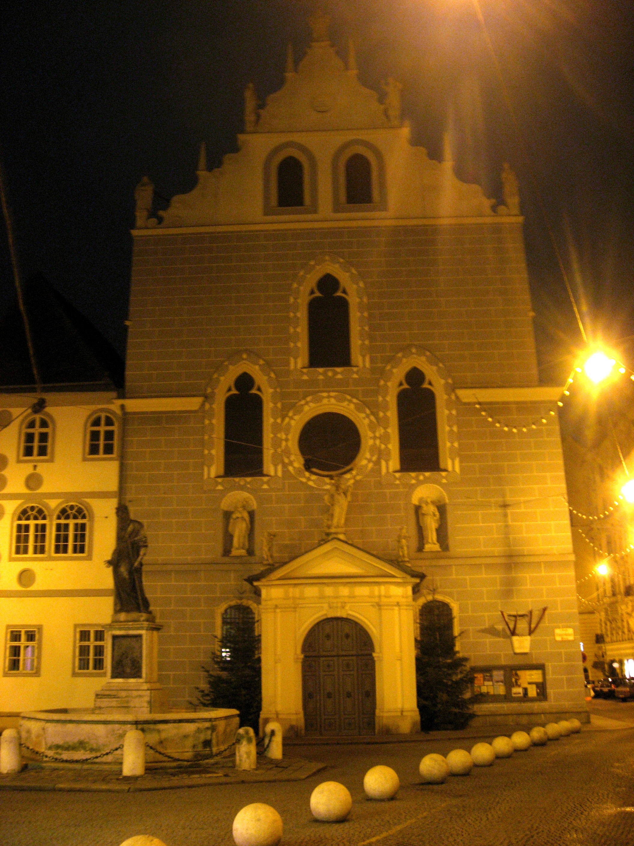 Franziskanerkirche